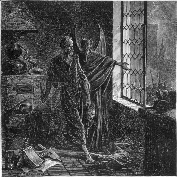 Gilles de Laval, baron de Retz. Illustration extraite de l'ouvrage de Pierre Christian (Pierre Pitois), Histoire de la magie, du monde surnaturel et de la fatalité à travers les temps et les peuples, Paris, Furne, Jouvet et Cie (éditeurs), p. 399.